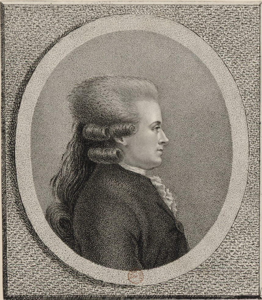 Portrait de Jean-Jacques Duval d'Eprémesnil (1745-1794)